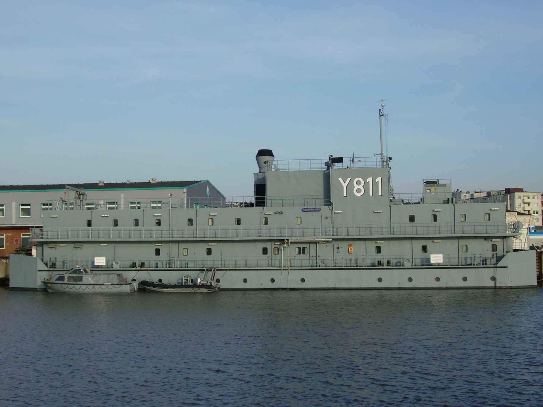 Das Wohnschiff "Knurrhahn" der Bundesmarine mit der Kennung "Y811" bei MWB